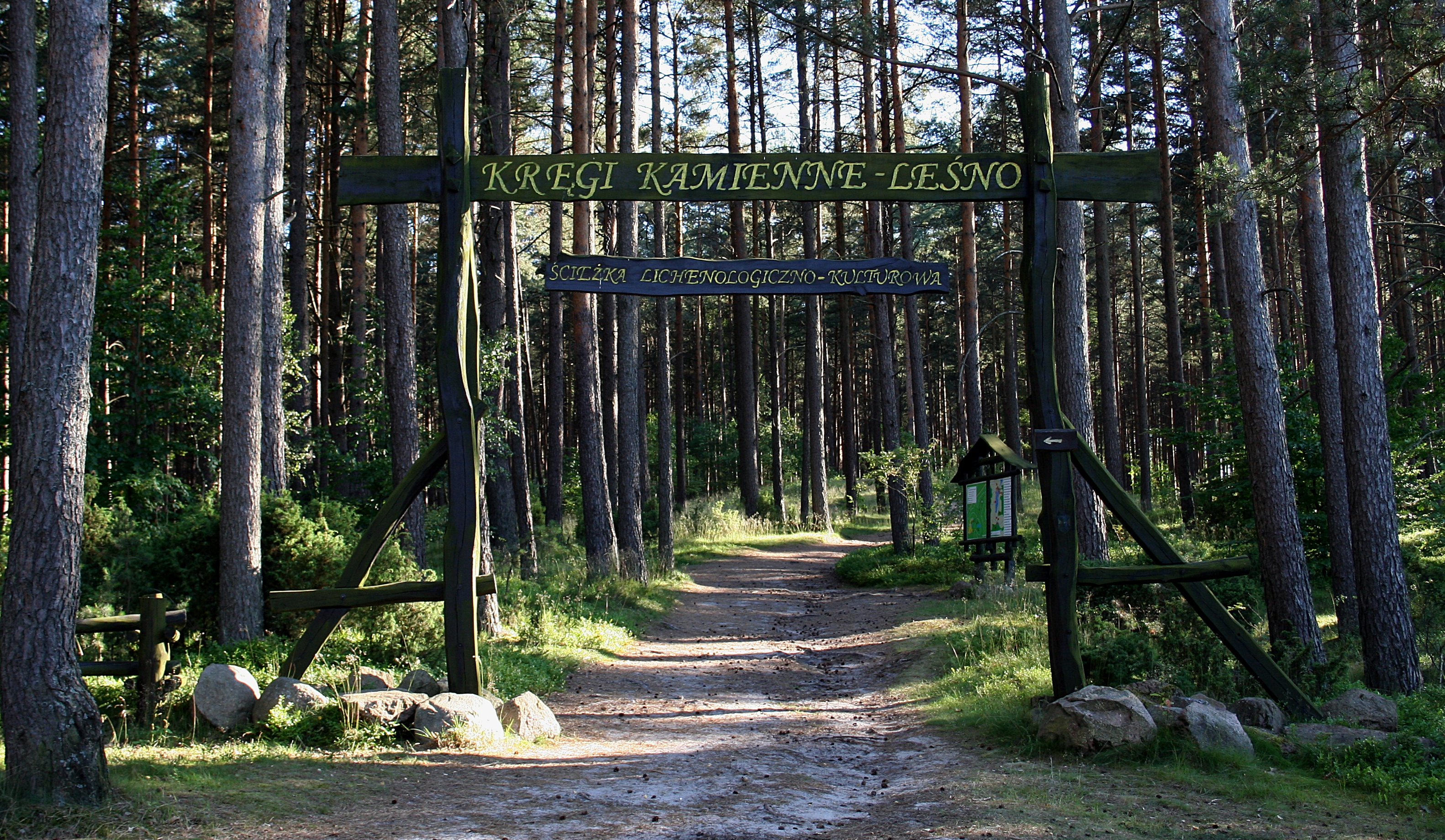 Ścieżka lichenologiczno-kulturowa w Leśnie, brama